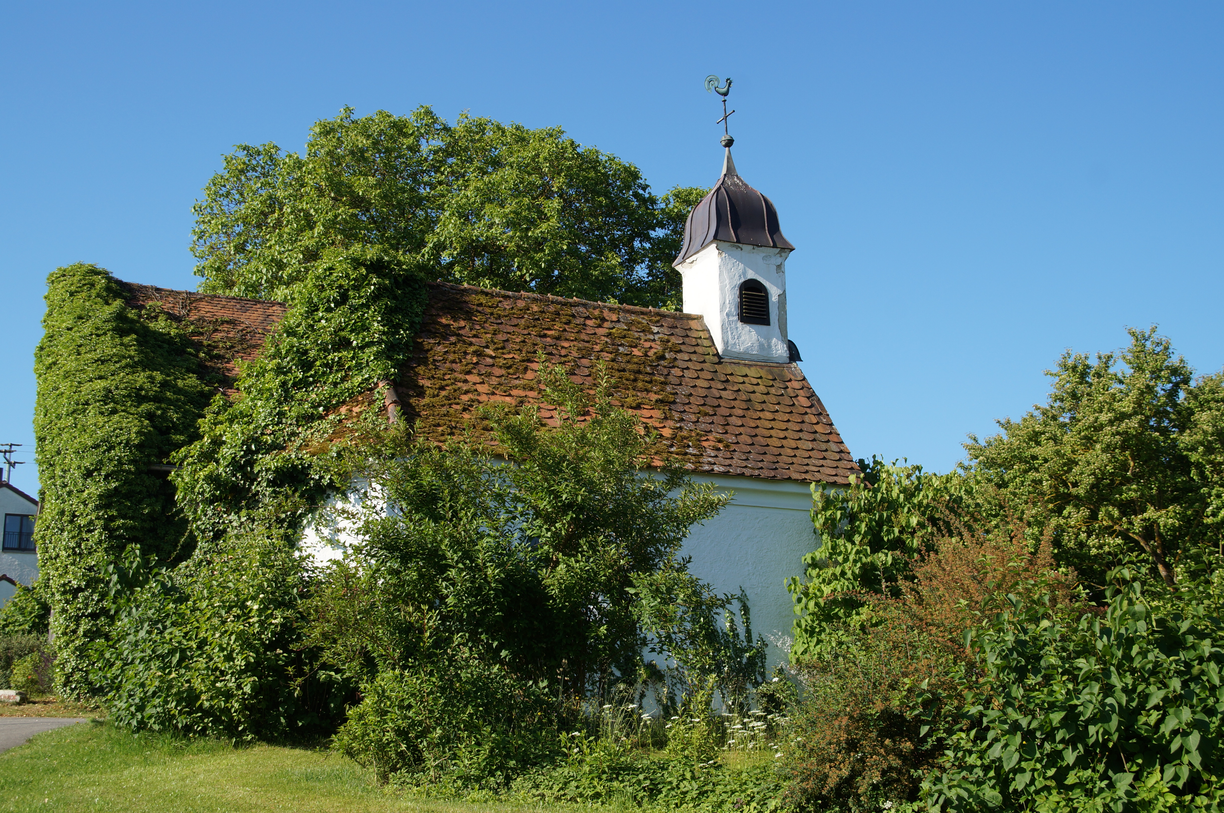 Wegkapelle Vierzehn Nothelfer, abgewalmter Satteldachbau mit Giebeldachreiter und Welscher Haube, 1930; mit älterer Ausstattung